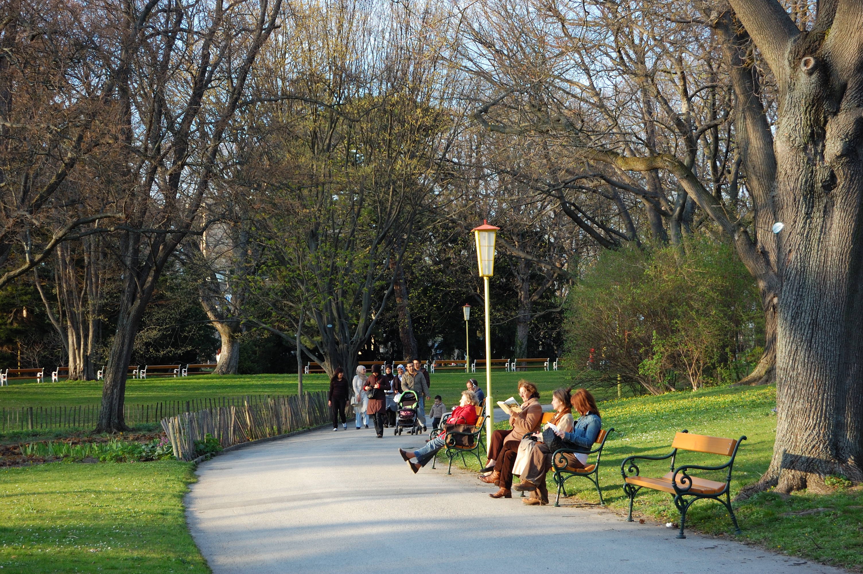 Türkenschanzpark